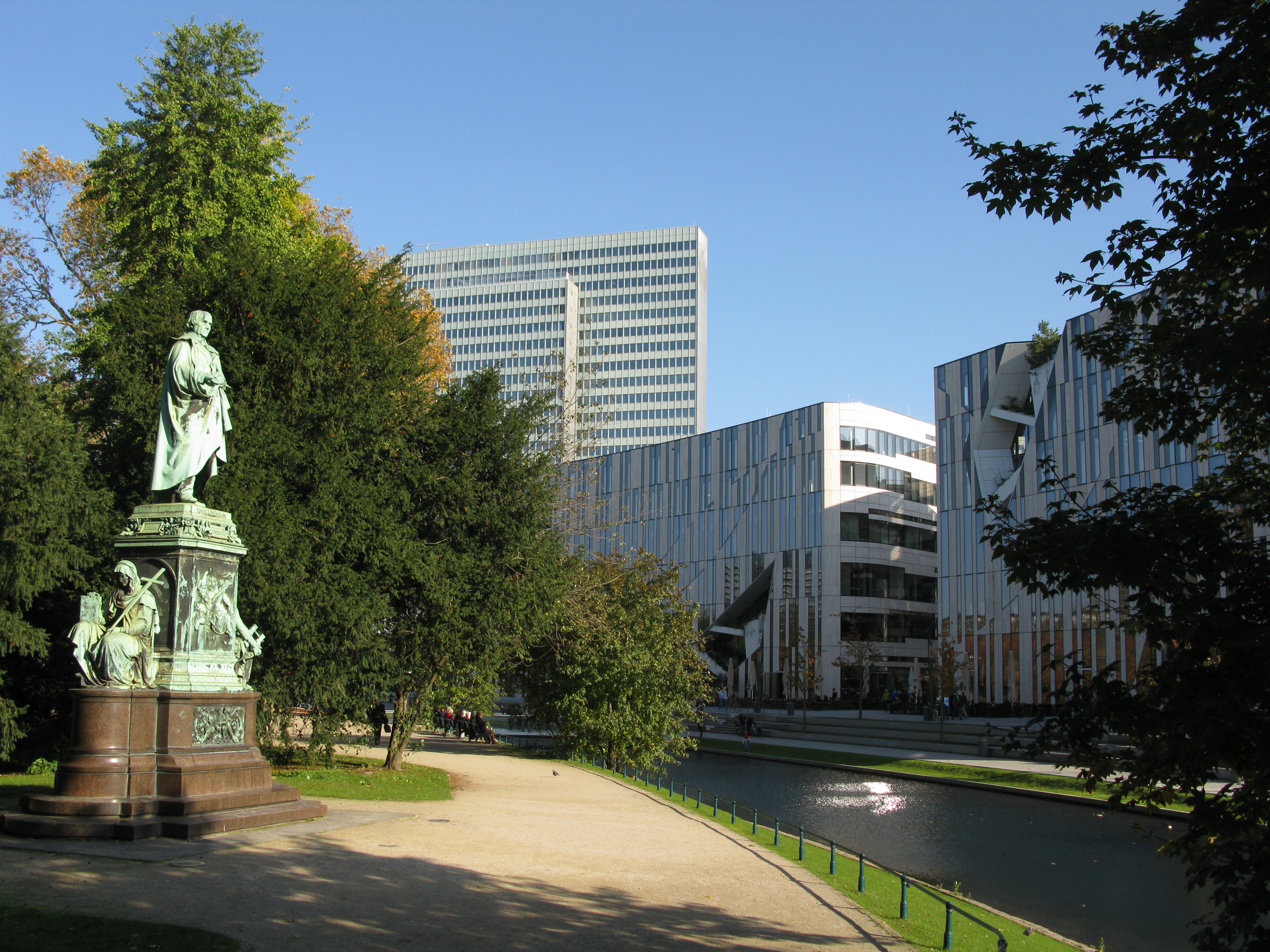 Cornelius-Denkmal, Dreischeibenhaus und Libeskind-Bauten am Kö-Bogen (v.l.n.r.) am Düsseldorfer Hofgarten